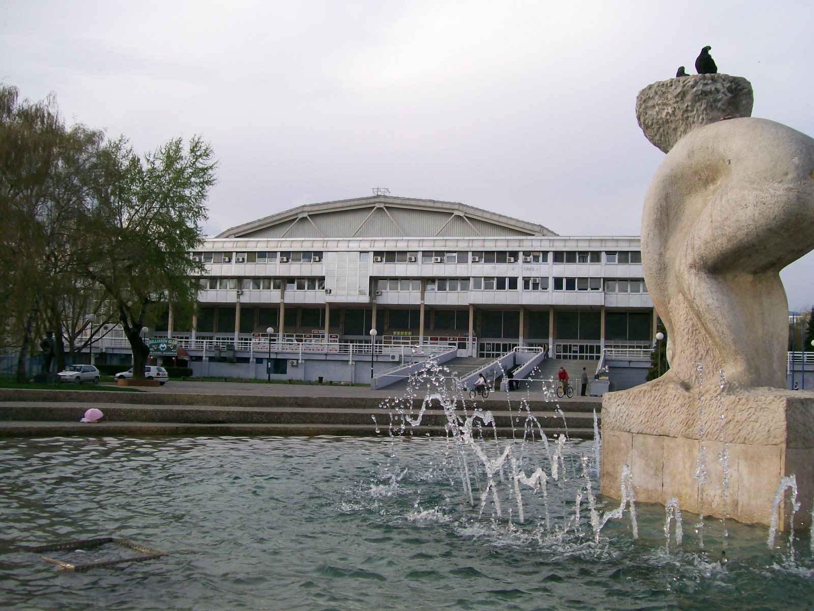 Dom sportova